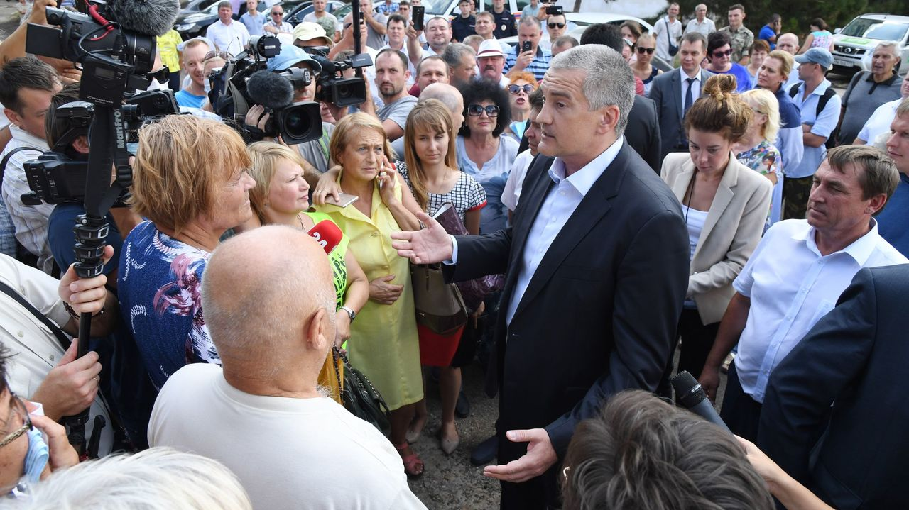 Глава Республики Крым Сергей Аксёнов выехал в город Армянск, где пообщался с местными жителями по поводу ситуации с ликвидацией последствий выбросов в городе.